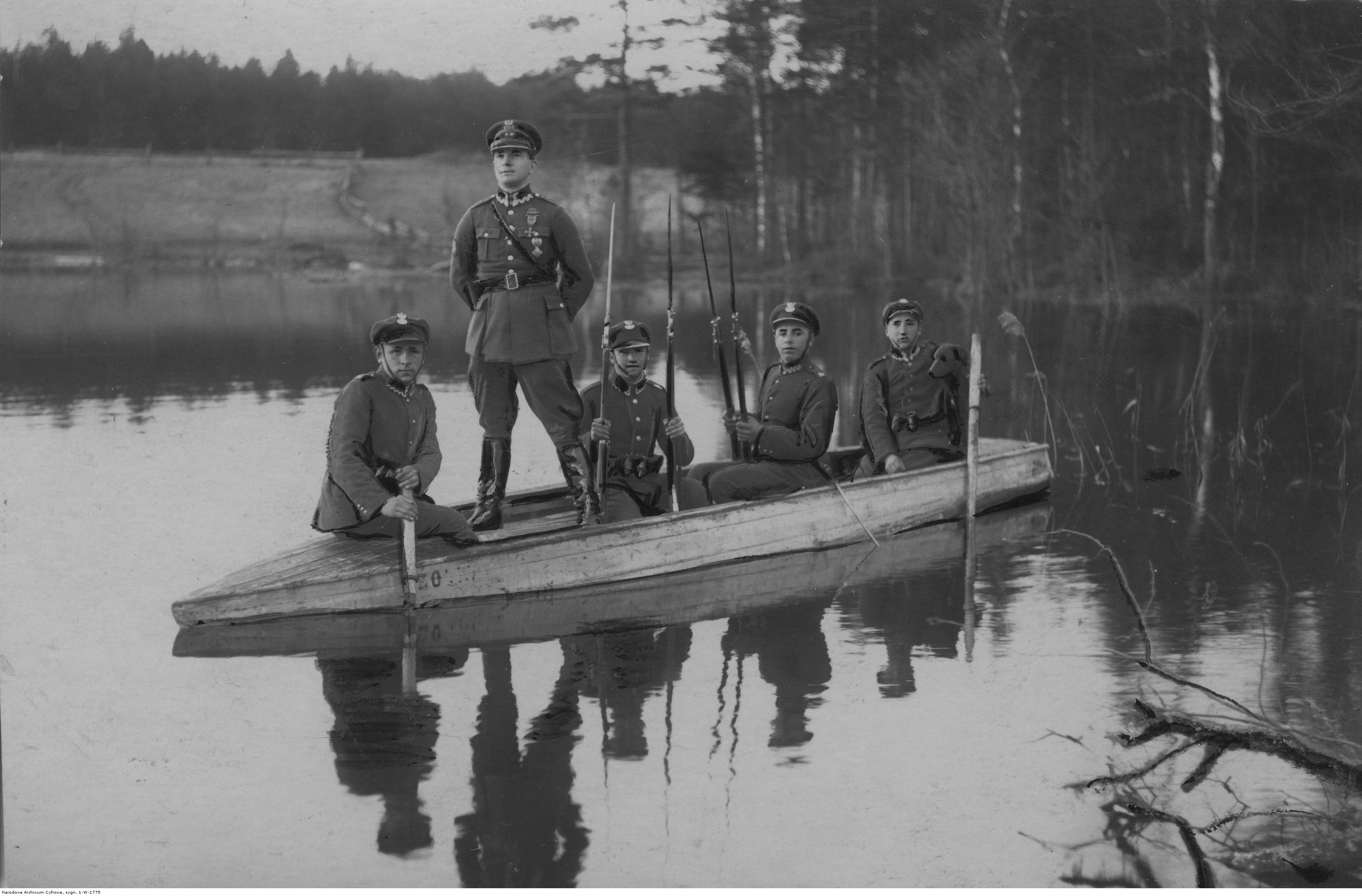 Patrol Batalionu Korpusu Ochrony Pogranicza "Nowe Święciany" na jeziorze. Koncern Ilustrowany Kurier Codzienny - Archiwum Ilustracji